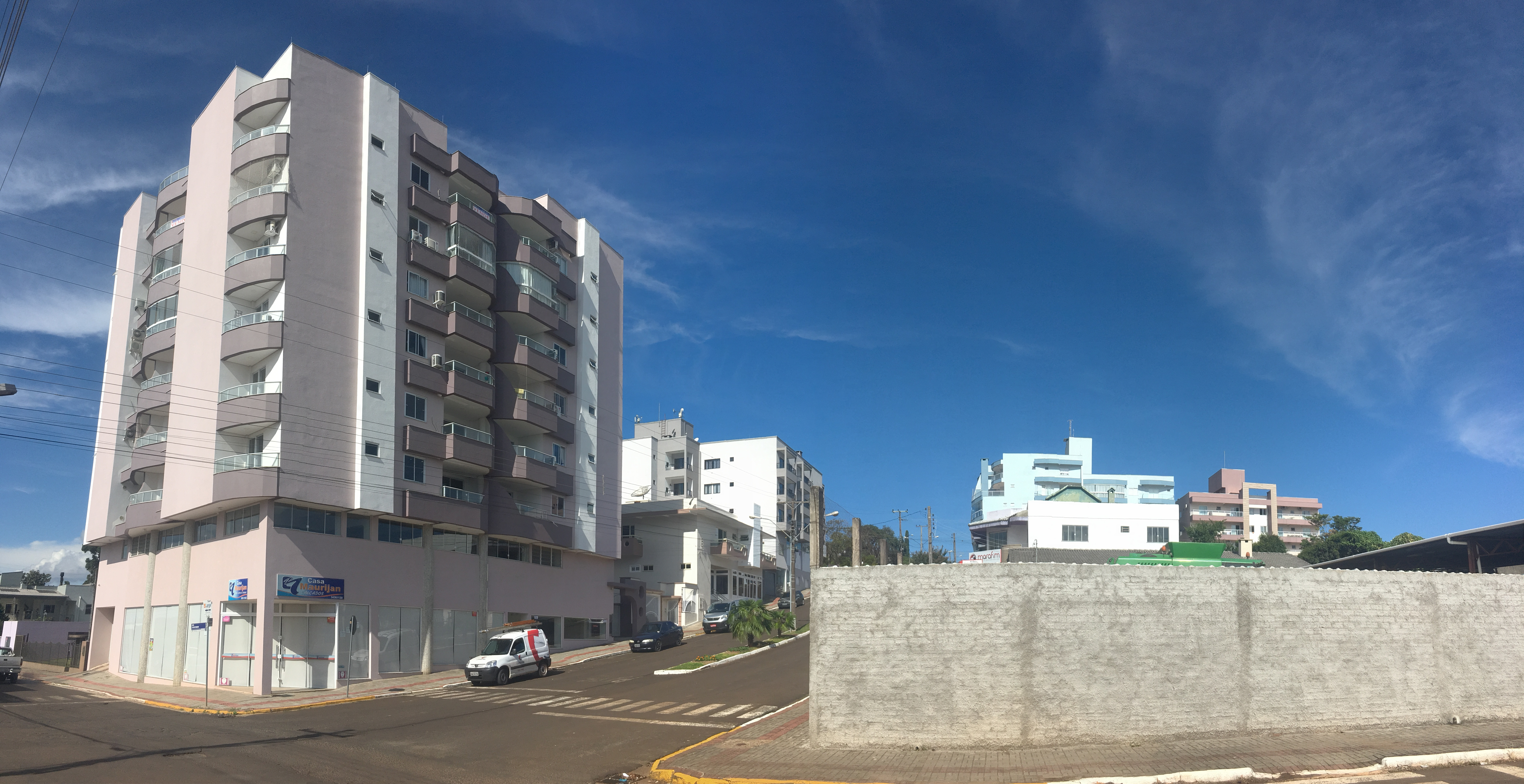 Panorâmica